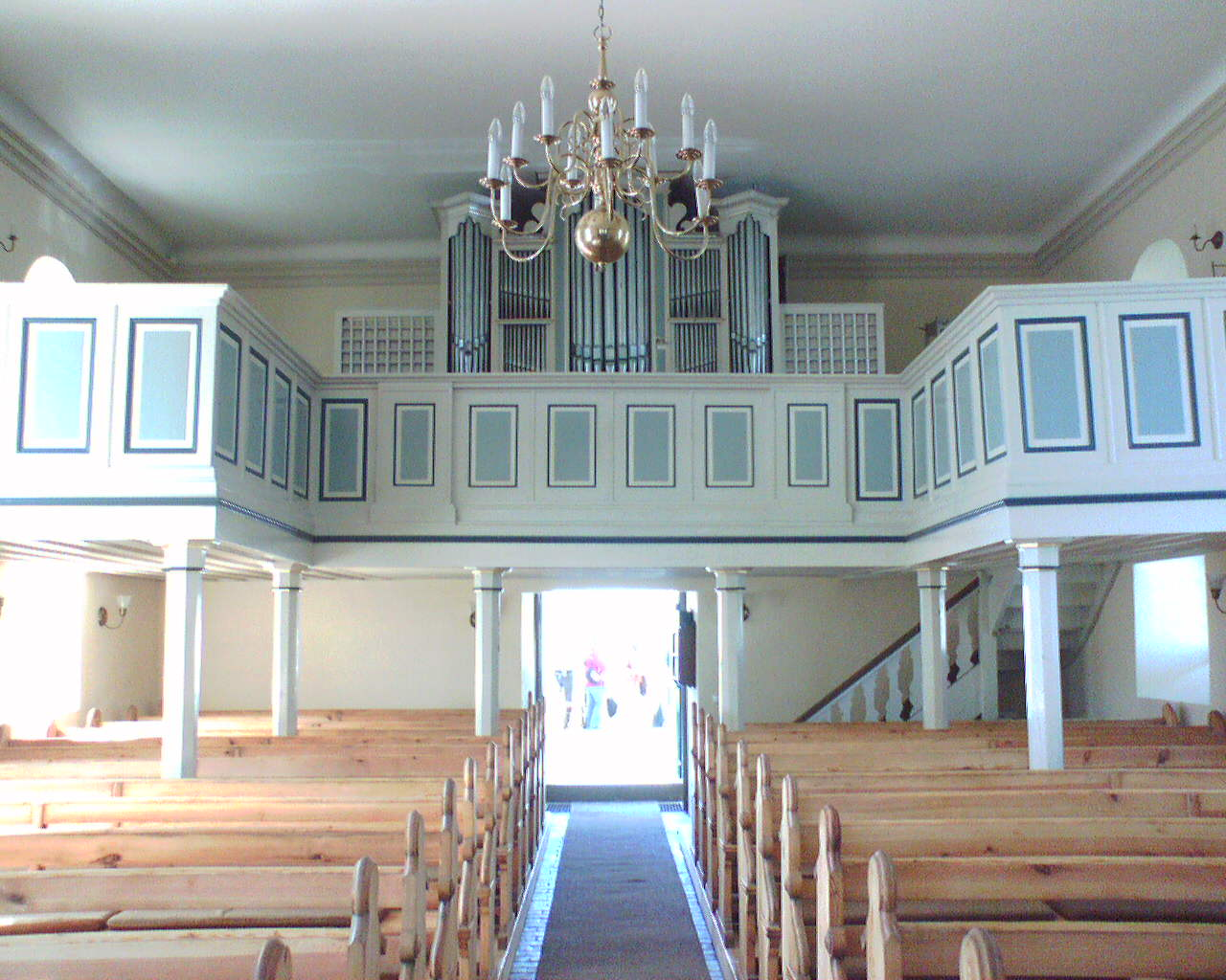 Dorfkirche Bohnsdorf, Innenraum mit Blick auf Orgelempore